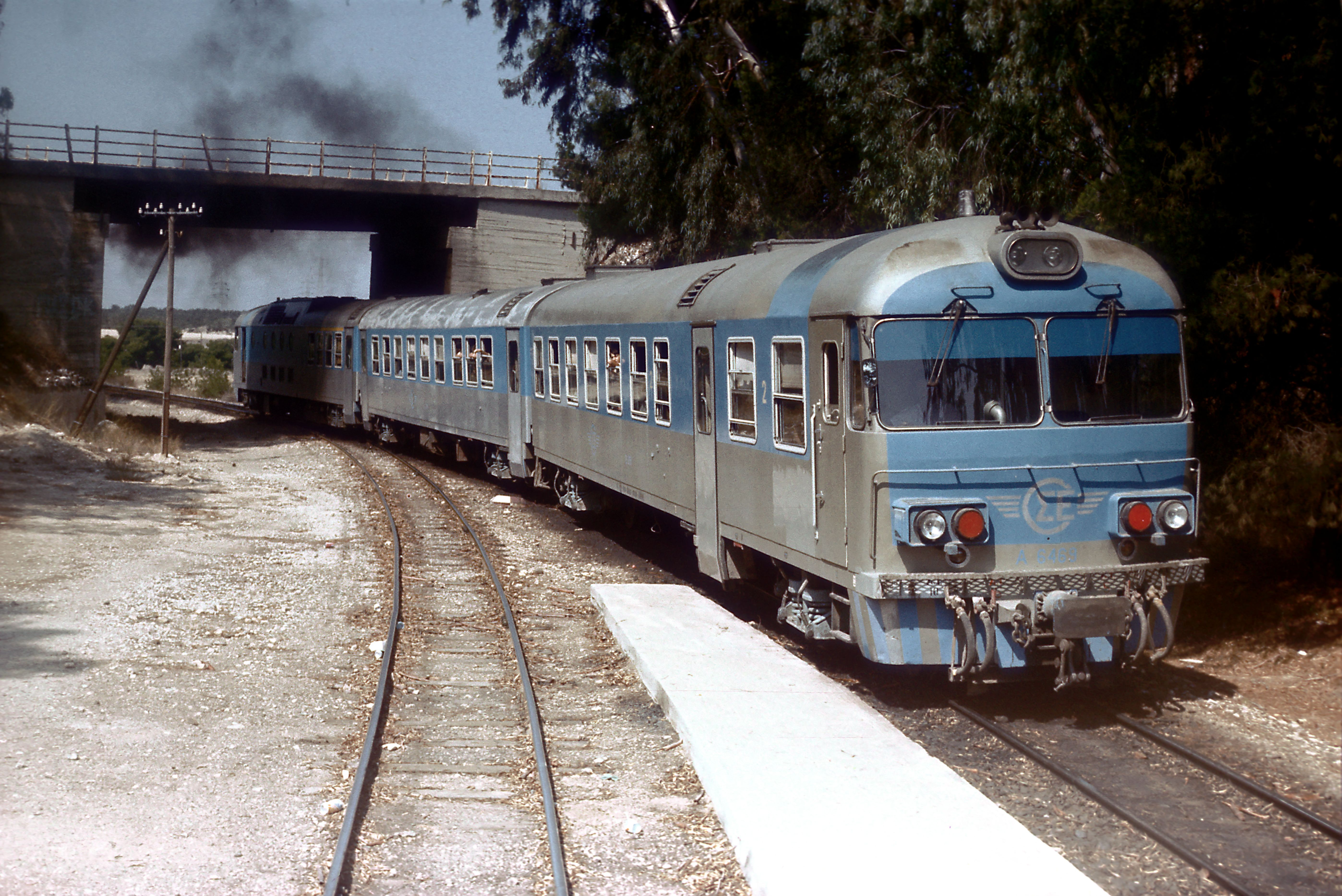 Nachschuss Richtung Kórinthos, der Zug kommt von Pireás.